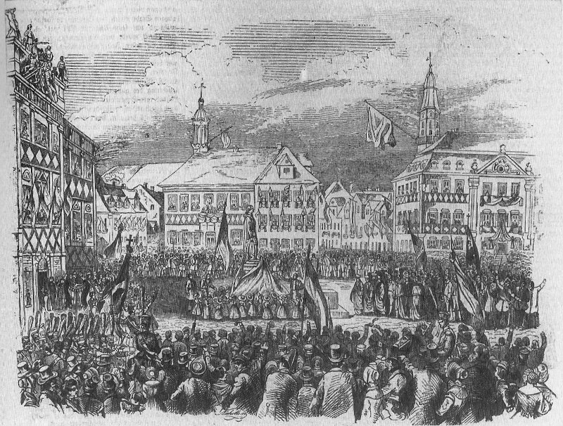 Enthüllung des Markgrafendenkmals in Erlangen. Illustrirte Zeitung vom 18. November 1843.